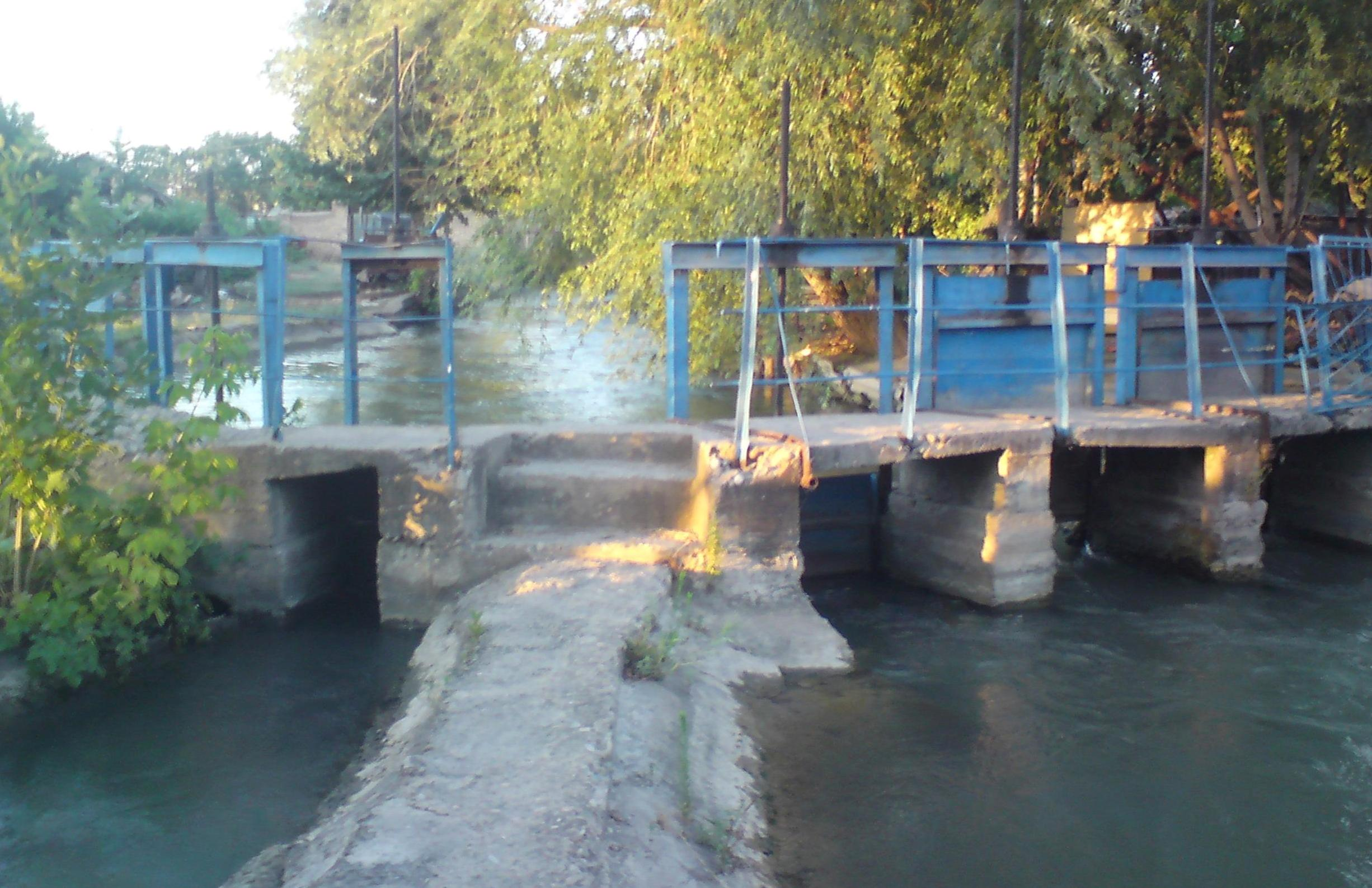 Окончание канала Карасу (перед разделением), начало канала (арыка) Урус (справа после разделения), город Ташкент